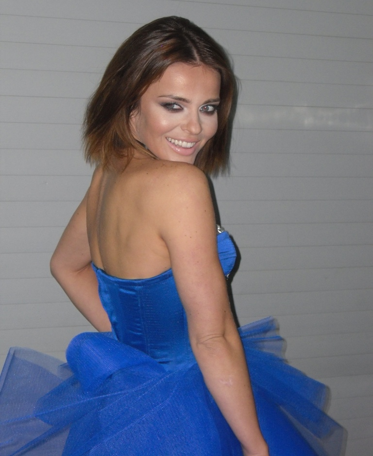 Zdjęcie zrobione podczas Eska Music Awards 2011 w katowickim Spodku.